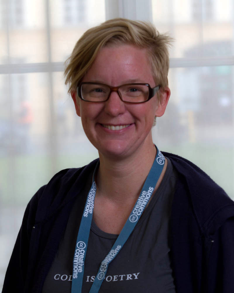 Kristina Alexanderson